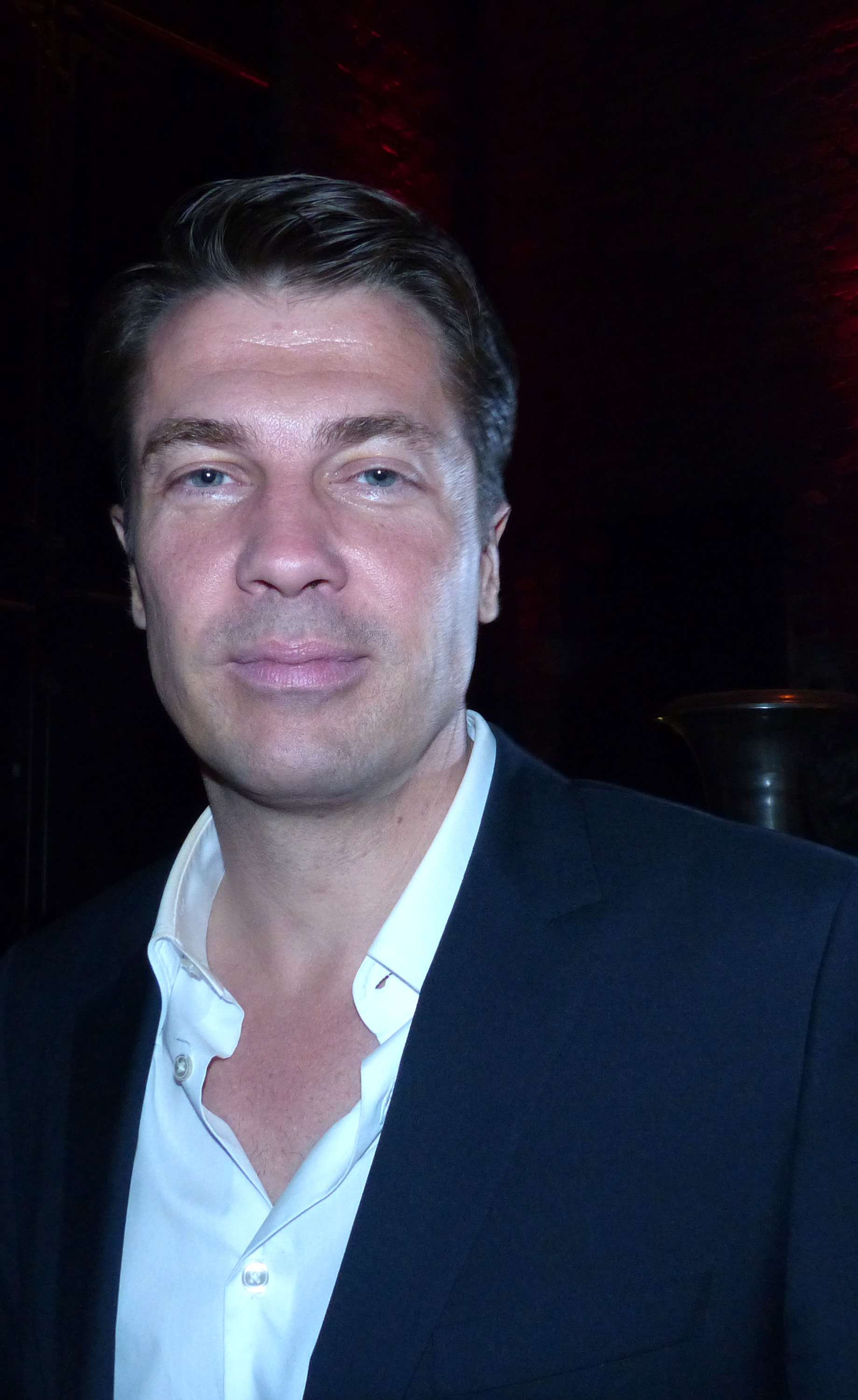 Wolfram Grandezka, 18. Jahre Verbotene Liebe Party, Düsseldorf